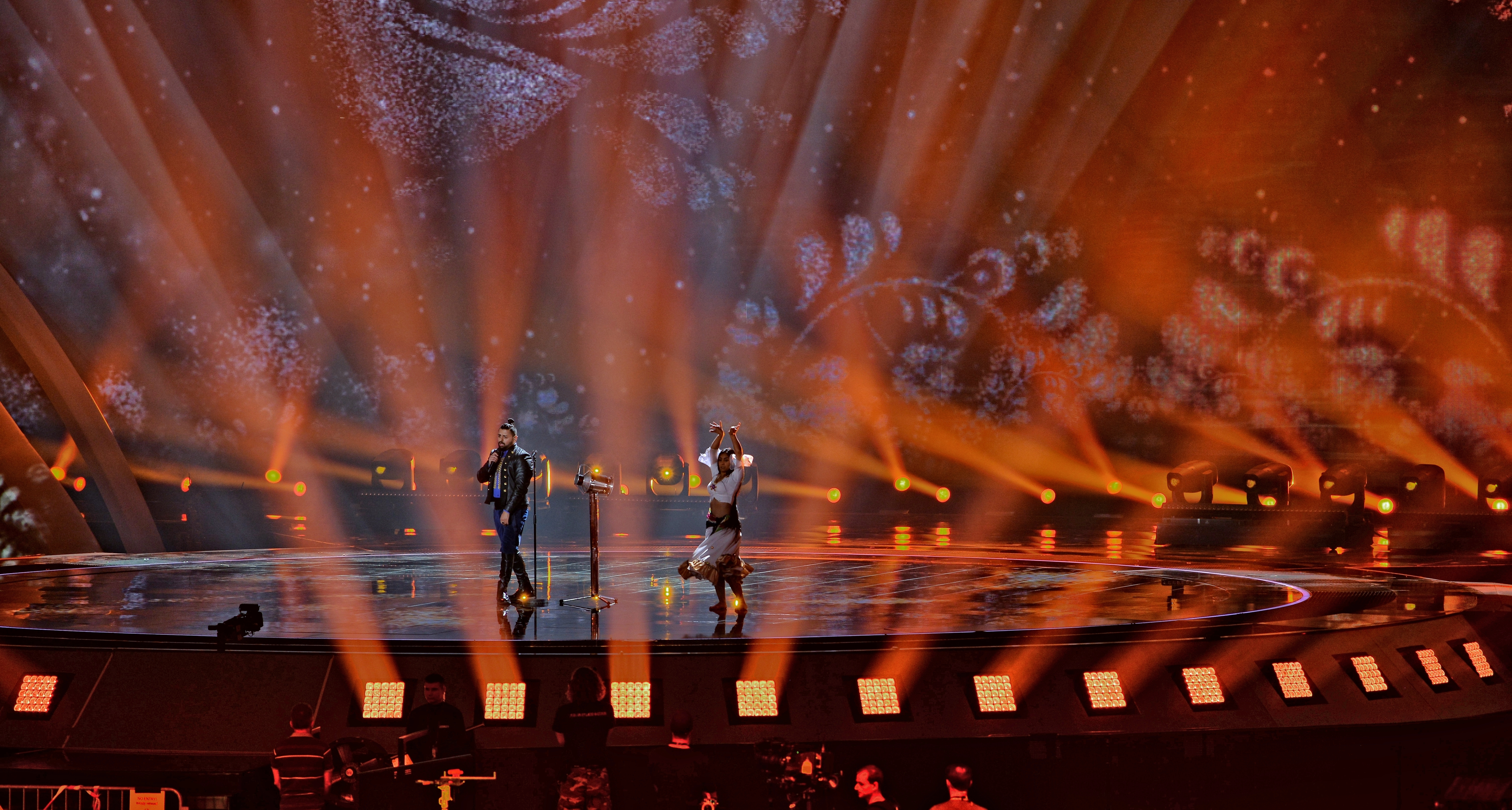 Репетиція виступу угорського співака ромського походження Йоці Папoї під час пісенного конкурсу Євробачення в Києві 2017